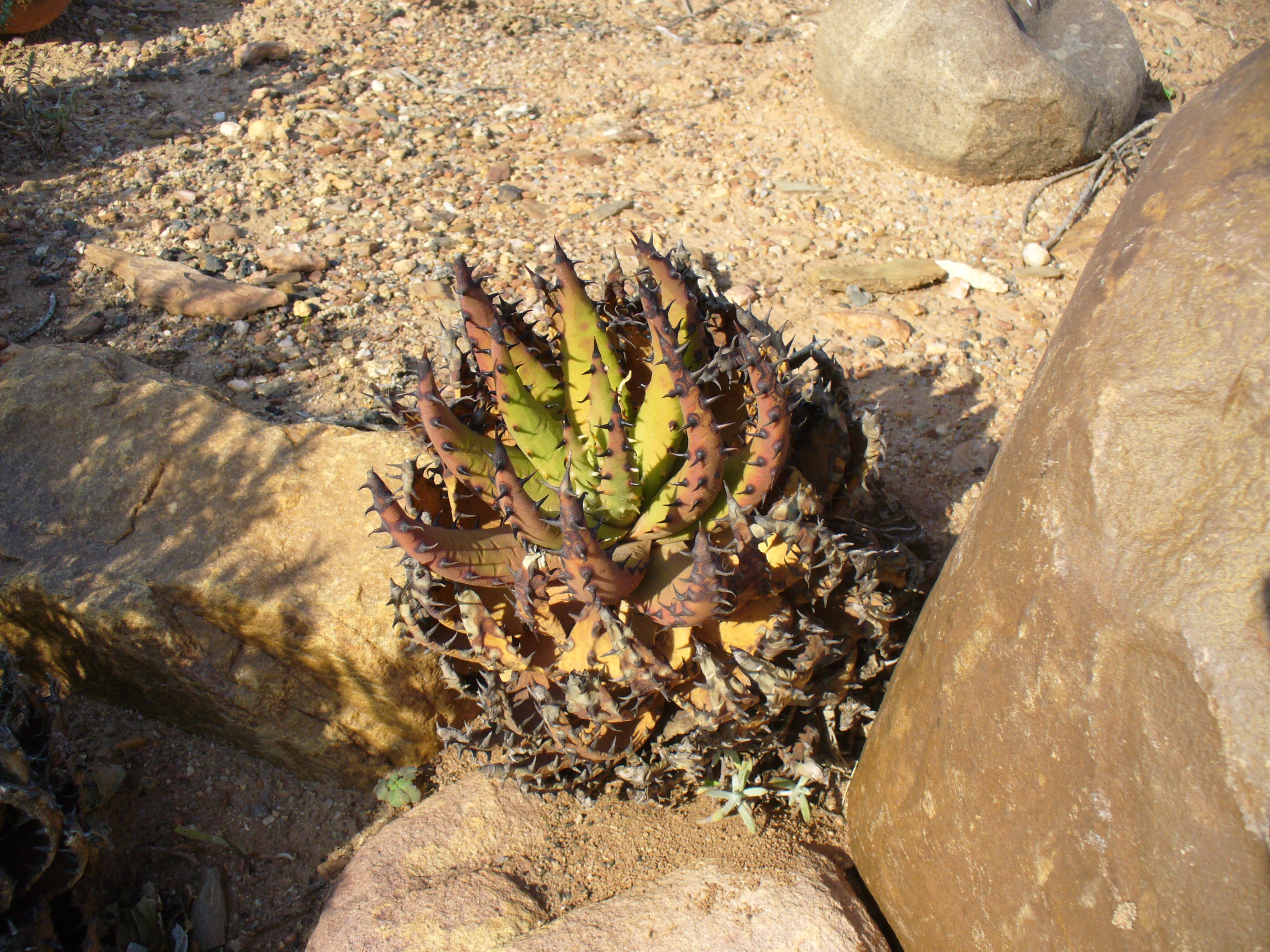 Aloe melanacantha, Worcester Botanic Gardens, Cape